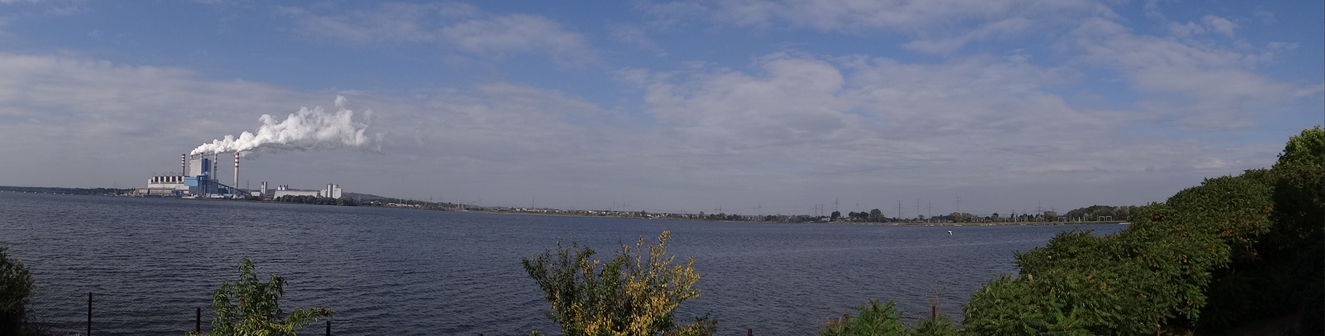 Widok z zamku jeziora Gosławickiego i elektrowni Pontnów z lewej strony kadru